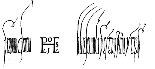 Signatur Ludwig_der_Deutsche